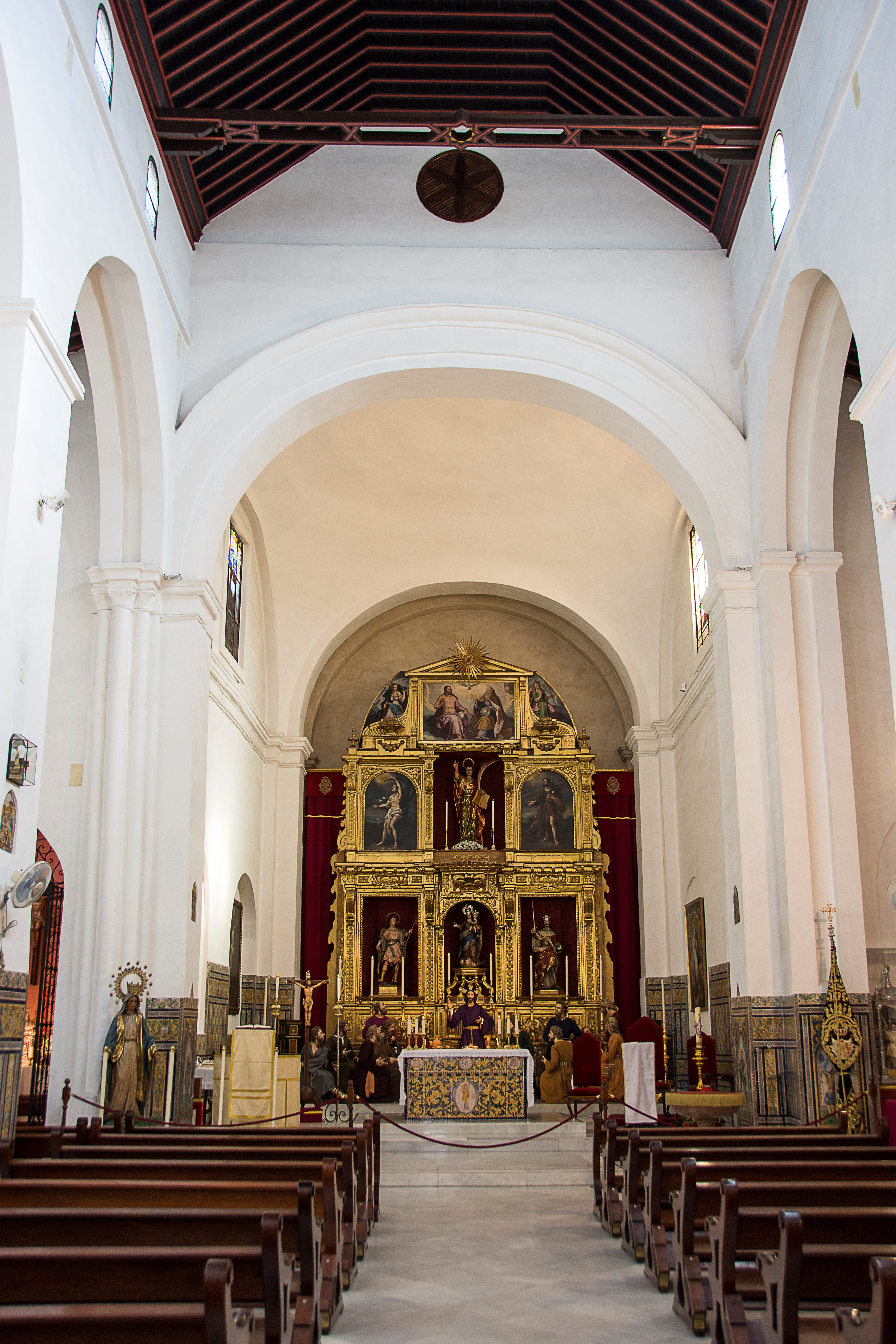 Interior y retablo mayor de la iglesia de San Román en Sevilla.